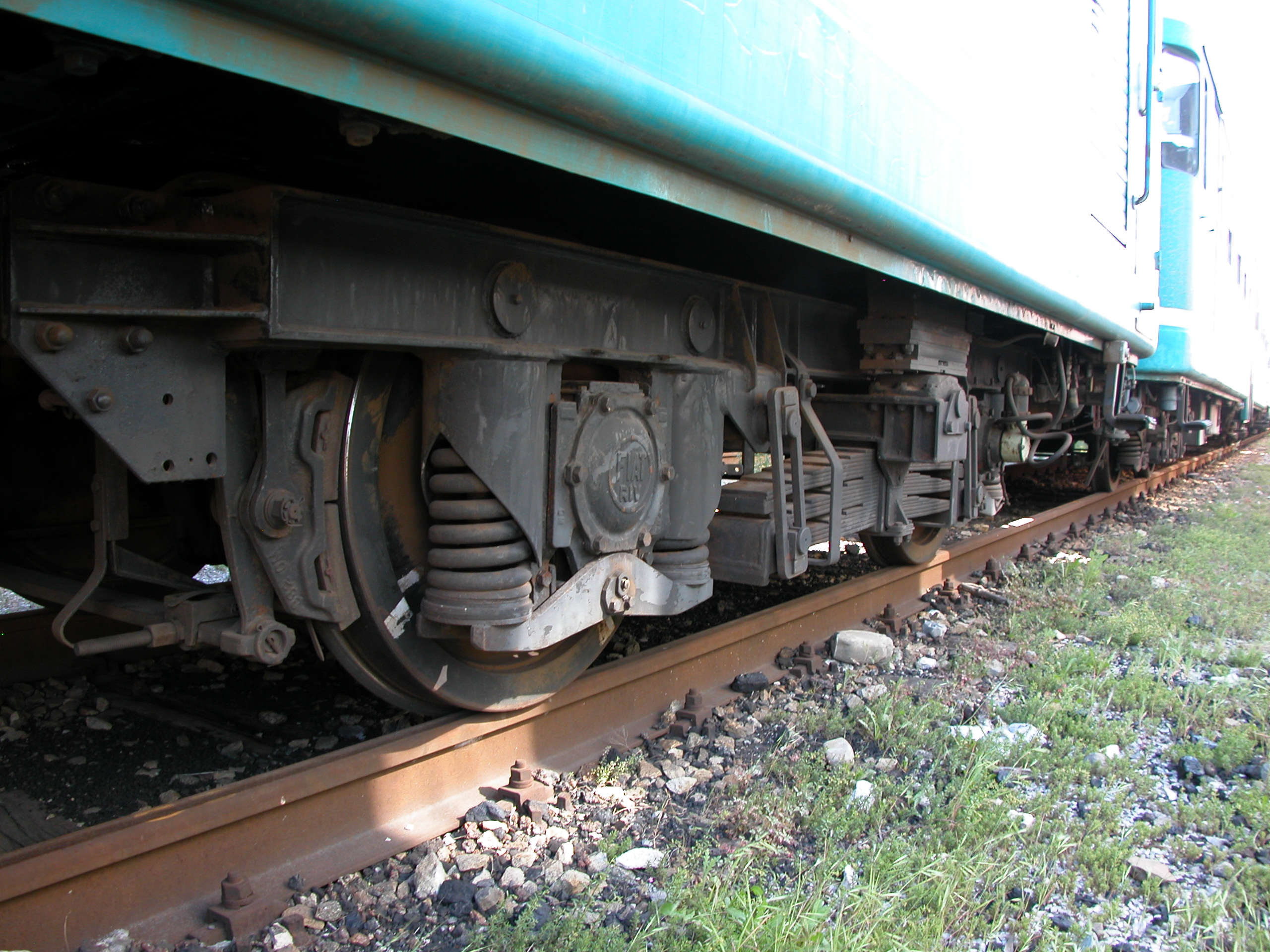 Carrello dell'automotrice FS ALn 668.1462, comune alle serie di costruzione FIAT ALn 668.1400, 1500, 1600 e 1700. In primo piano si vedono i due ceppi del freno e le molle elicoidali della sospensione primaria, mentre in secondo piano si possono notare la molla a balestra tripartita della sospensione secondaria e l'estremità della traversa oscillante con il rullo su cui appoggia la cassa dell'automotrice.